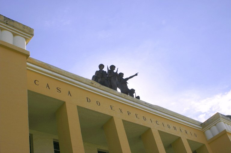 The top of Museu do Expedicionário, Curitiba, Paraná, Brasil